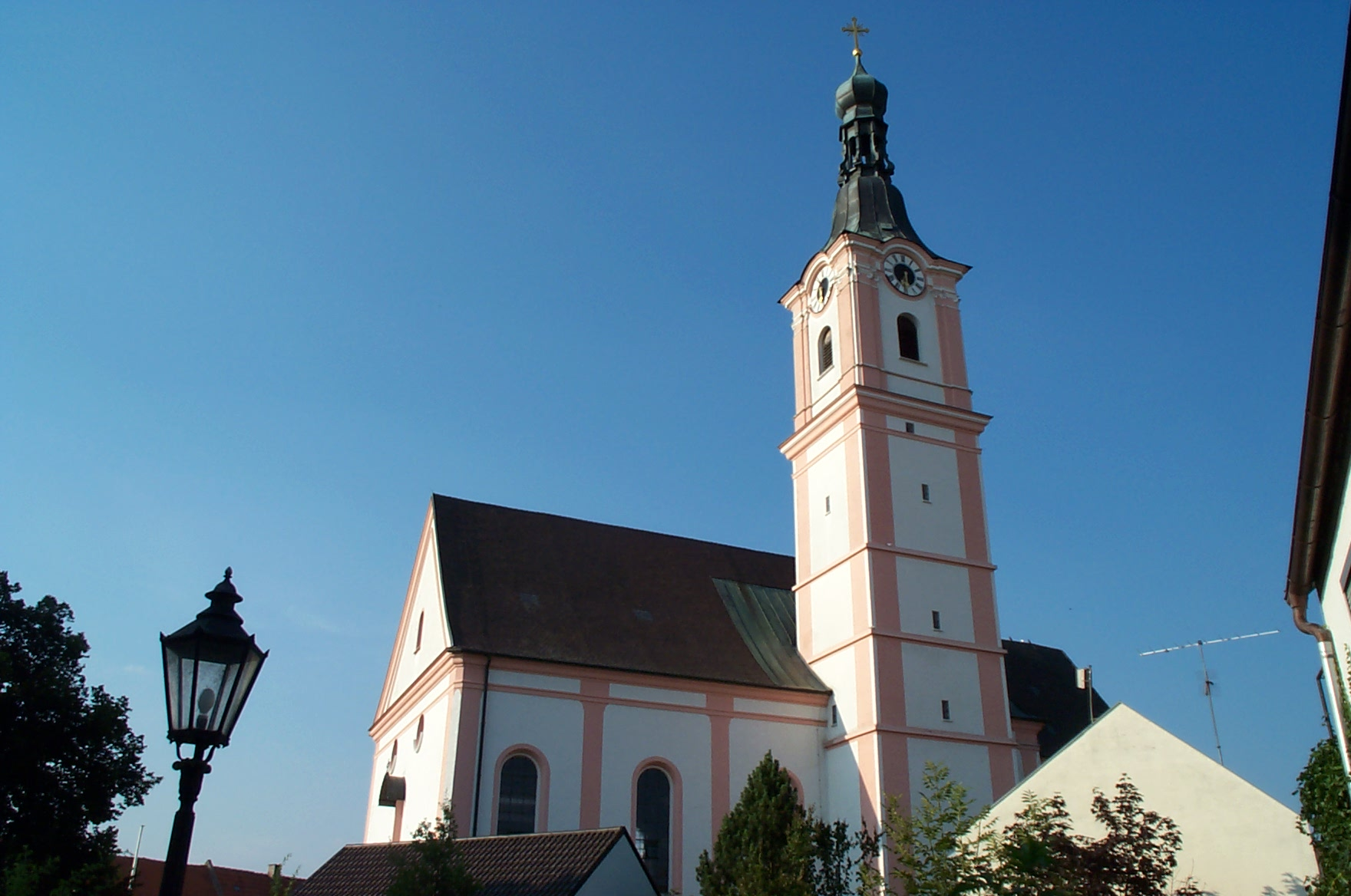 Geiselhöring Stadtpfarrkirche St. Petrus und Erasmus